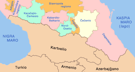 Politika mapo de Kaŭkazio.